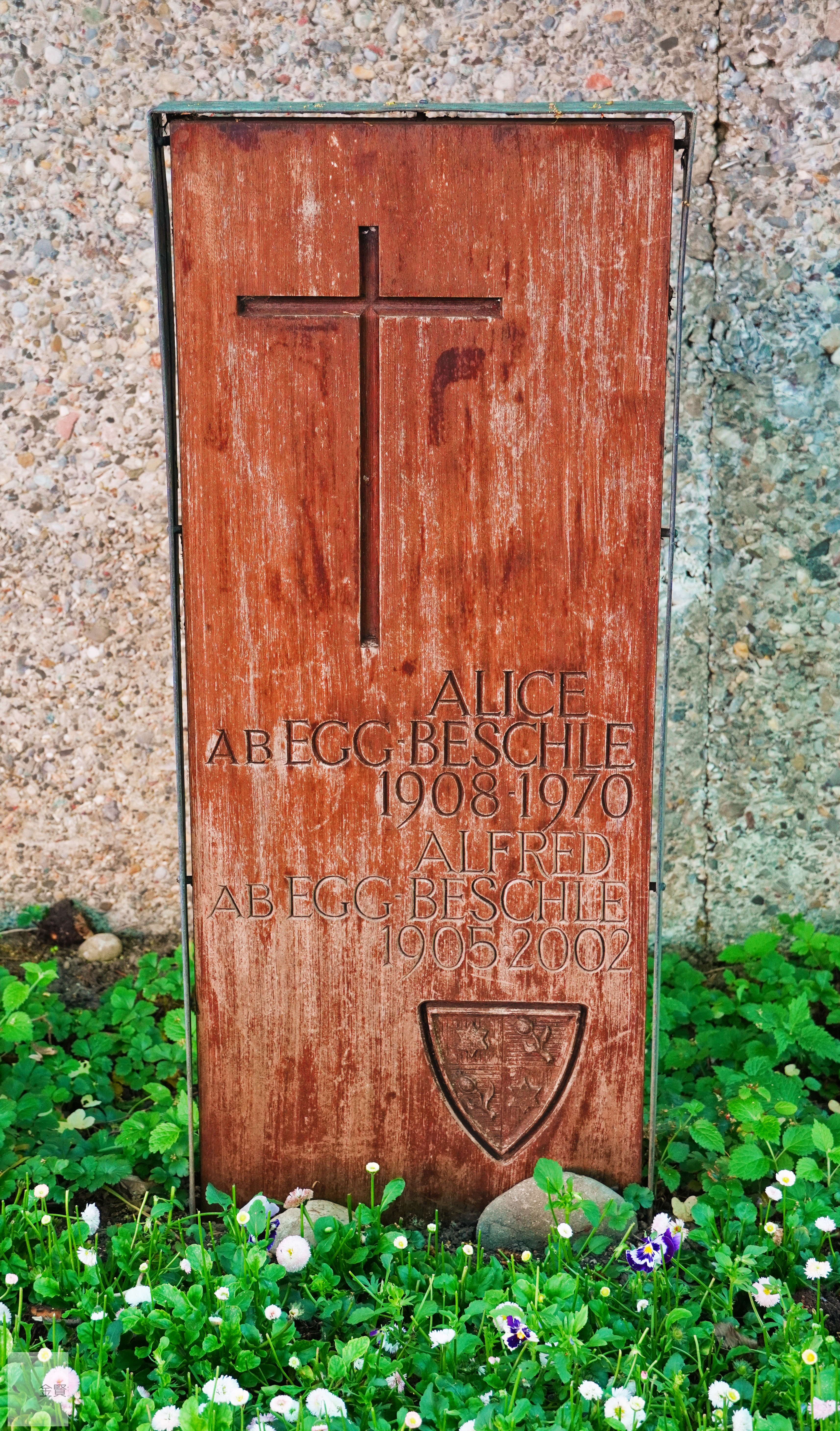 Grabstein von Alice und Alfred ab Egg-Beschle